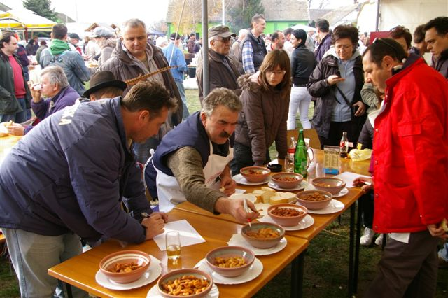 Čvarakfest, Karanac